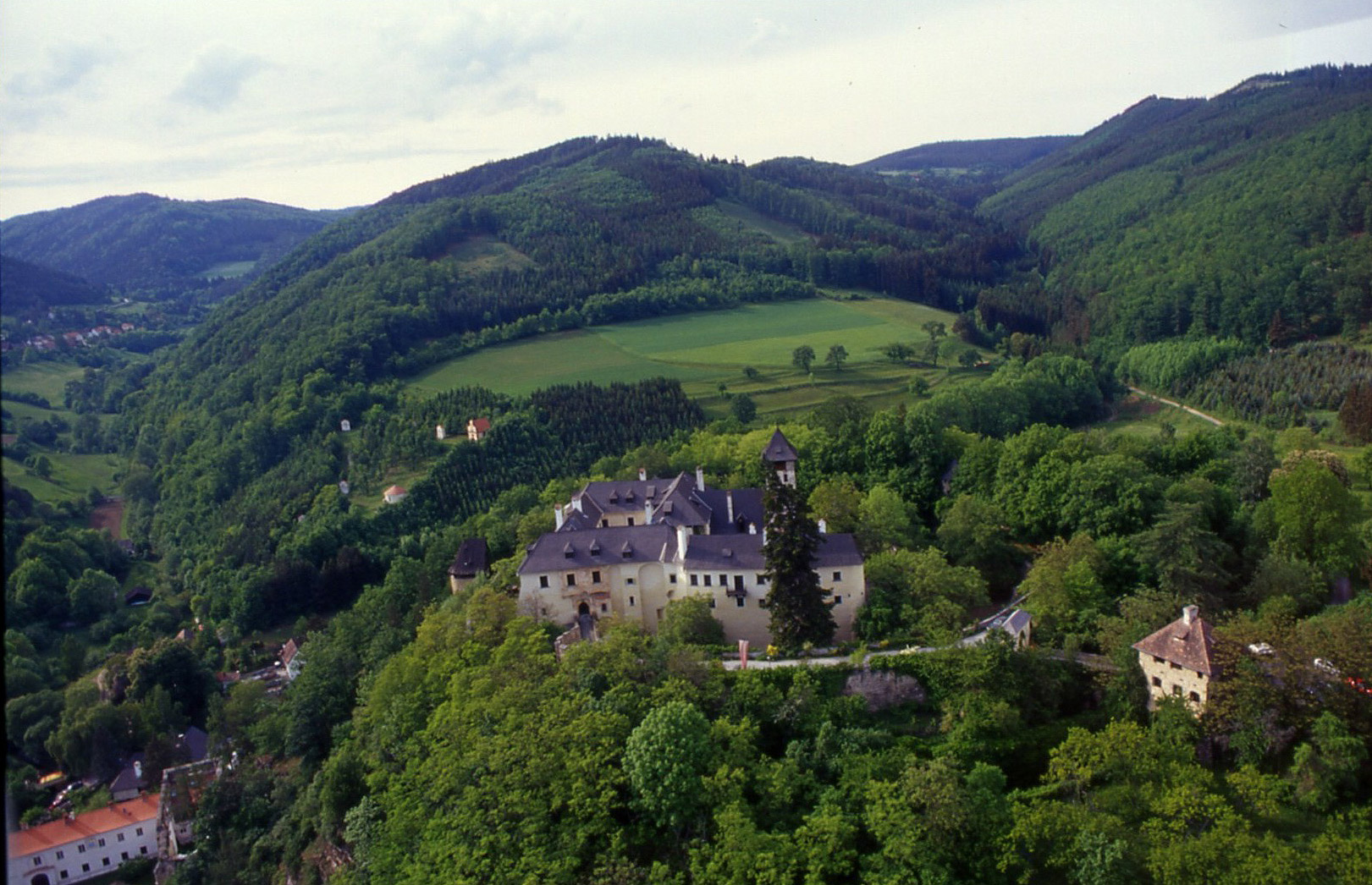 Burg Oberranna Object location48° 22′ 48.07″ N, 15° 20′ 21.23″ E